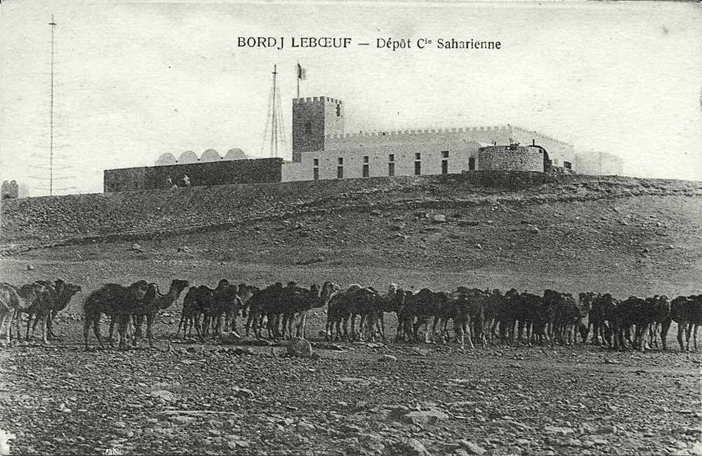 Bordj Leboeuf - Dépot de la compagnie saharienne